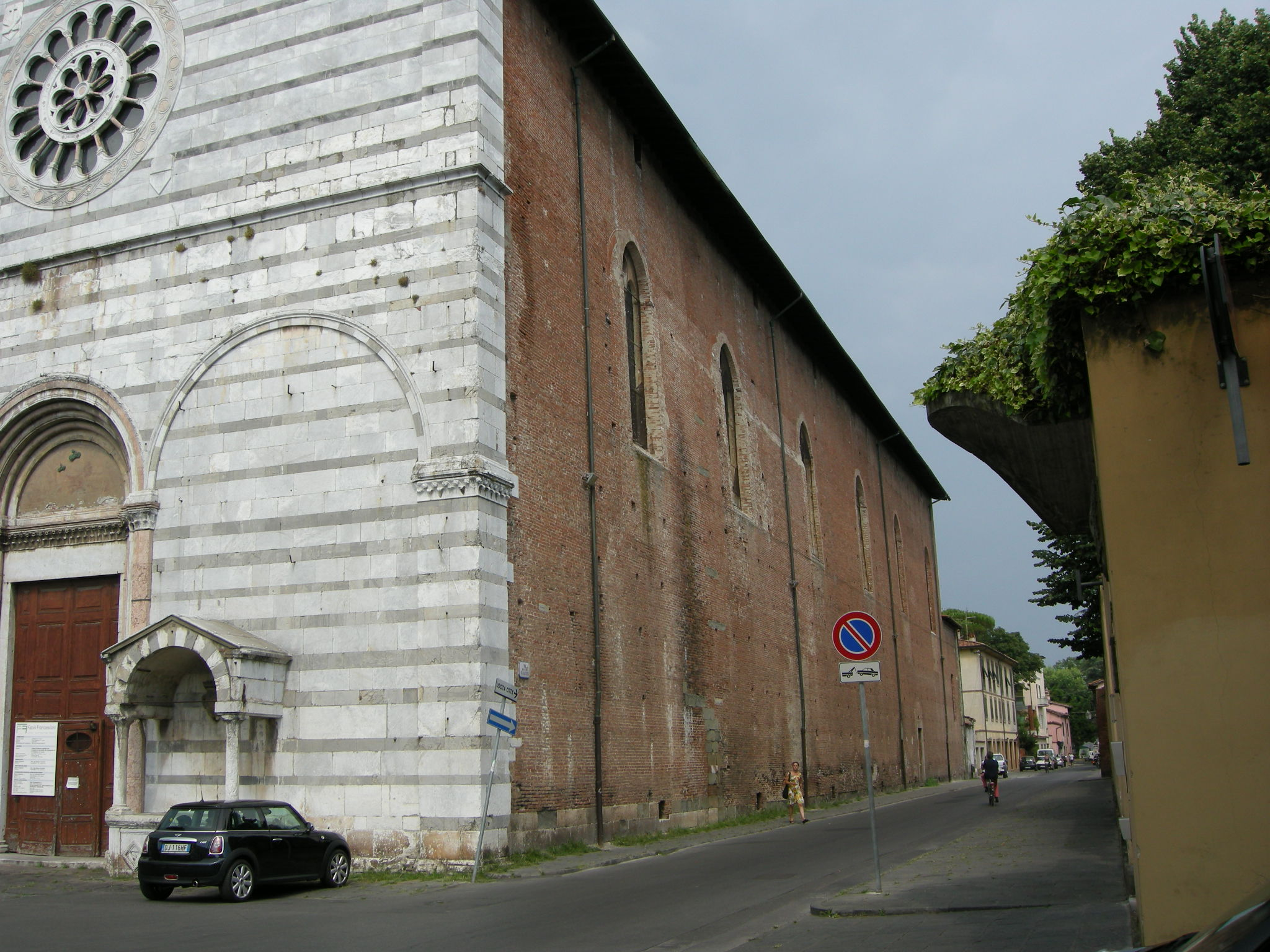 Lucca, san francesco